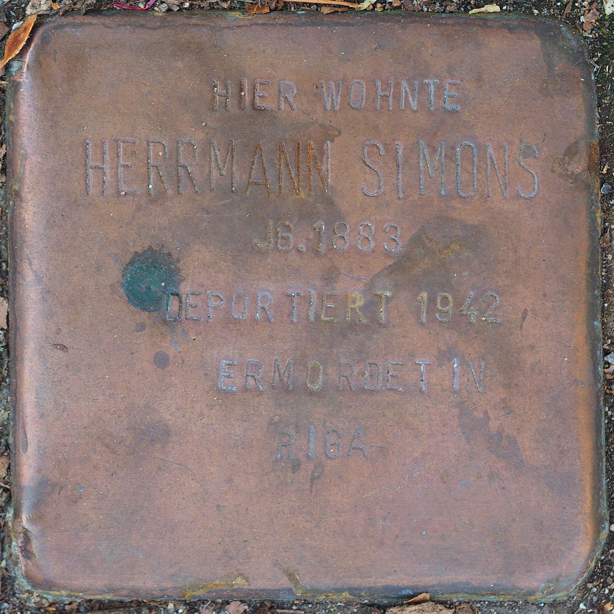 Stolperstein VIE: Simons, Herrmann